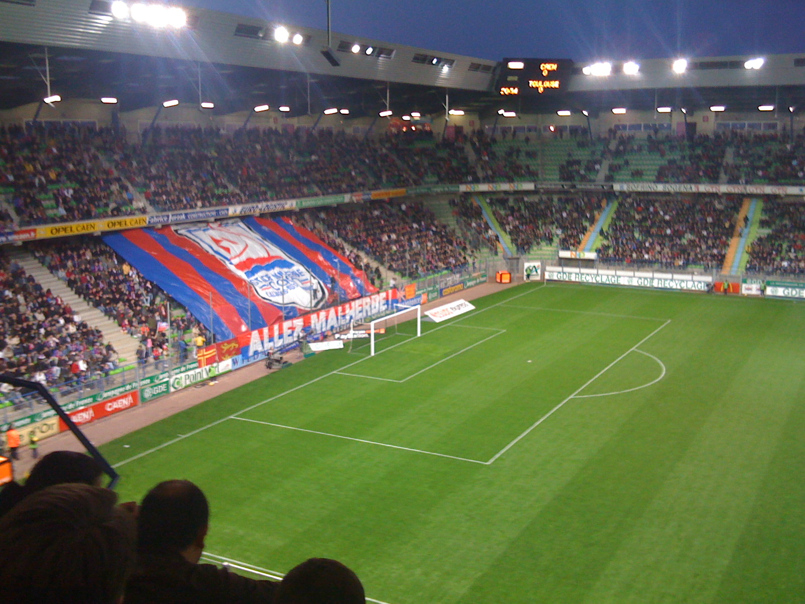 Supporters du SM Caen au stade Michel d'Ornano